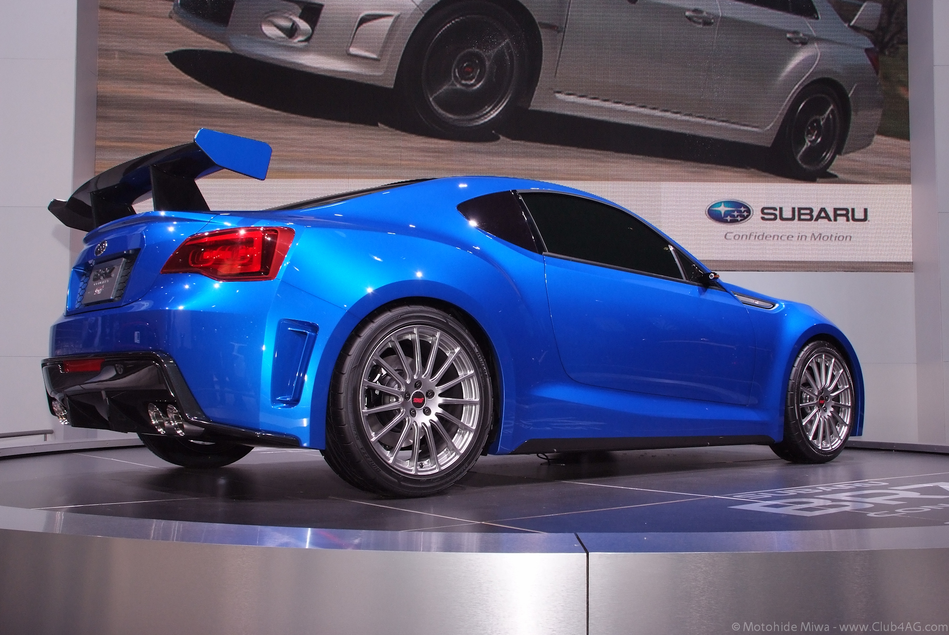 Subaru BRZ STi Concept